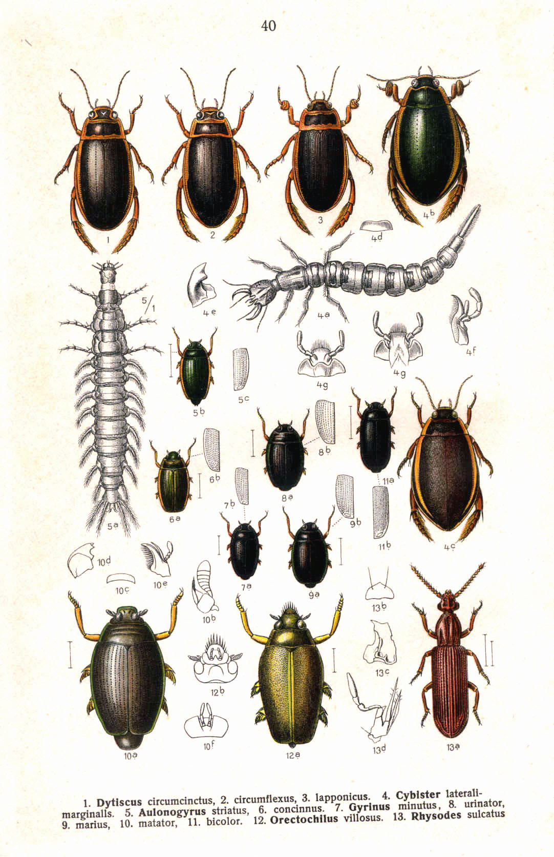 See image for index to numbers. Dytiscus circumcintus Ahr. = Dytiscus circumcintus Ahrens, 1811, adult female from dorsal Dytiscus circumflexus F. = Dytiscus circumflexus Fabricius, 1801, adult female from dorsal Dytiscus lapponicus Gyll. = Dytiscus lapponicus Gyllenhal, 1808, adult male from dorsal Cybister lateralimarginalis Degeer. = Cybister lateralimarginalis (De Geer, 1774) (4a: larva from dorsal, 4b: adult male from dorsal, 4c: adult female from dorsal, 4d: labrum of adult, 4e: mandible of adult, 4f: maxilla of adult, 4g: labium of adult from dorsal and ventral[verification needed]) Aulonogyrus striatus F. = Aulonogyrus striatus (Fabricius, 1792) (5a: larva, dorsal view, 5b: adult from dorsal, 5c: elytra pattern) Aulonogyrus concinnus Klug. = Aulonogyrus concinnus (Klug, 1834) (6a: adult from dorsal, 6b: elytra pattern) Gyrinus minutus F. = Gyrinus minutus Fabricius, 1798 (7a: adult from dorsal, 7b: elytra pattern) Gyrinus urinator Illig. = Gyrinus urinator Illiger, 1807 (8a: adult from dorsal, 8b: elytra pattern) Gyrinus marius [sic] Gyll. = Gyrinus marinus Gyllenhal, 1808 (9a: adult from dorsal, 9b: elytra pattern) Gyrinus matator [sic] L. = Gyrinus natator (Linnaeus, 1758) (10a: adult from dorsal, 10b: antenna, 10c: labrum, 10d: mandible, 10e: maxilla, 10f: labium) Gyrinus bicolor Payk. = Gyrinus paykulli Ochs, 1927 (11a: adult from dorsal, 11b: elytra pattern) Orectochilus villosus Müll. = Orectochilus villosus (O.F.Müller, 1776) (12a: adult from dorsal, 12b: head from ventral) Rhysodes sulcatus F. = Rhysodes sulcatus (Fabricius, 1787) (13a: adult from dorsal, 13b: labrum, 13c: mandible, 13d: maxilla)